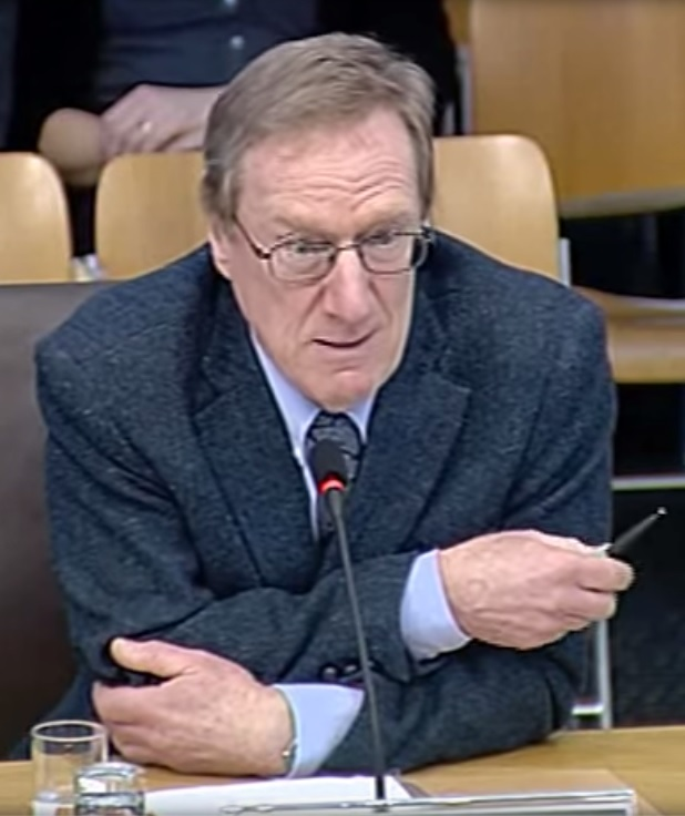 Michael Keating, 2015.